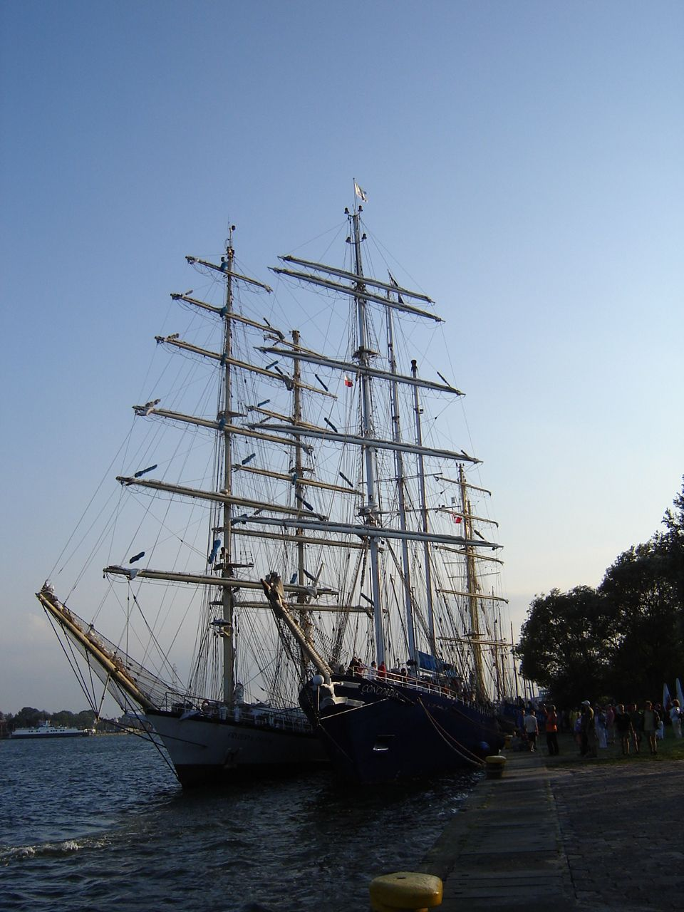 Żaglowce "Concordia" i "Fryderyk Chopin" podczas Tygodnia Kultury Morskiej w Świnoujściu